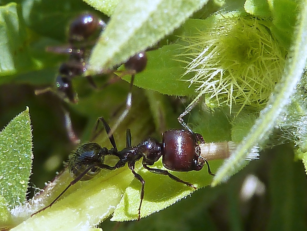 Hormiga cabezona (Messor barbarus) llevándose al nido una cipsela con eleosoma de Centaurea pullata (Cabeza de Pollo) - La Huerta, Albatera (Alicante, España).